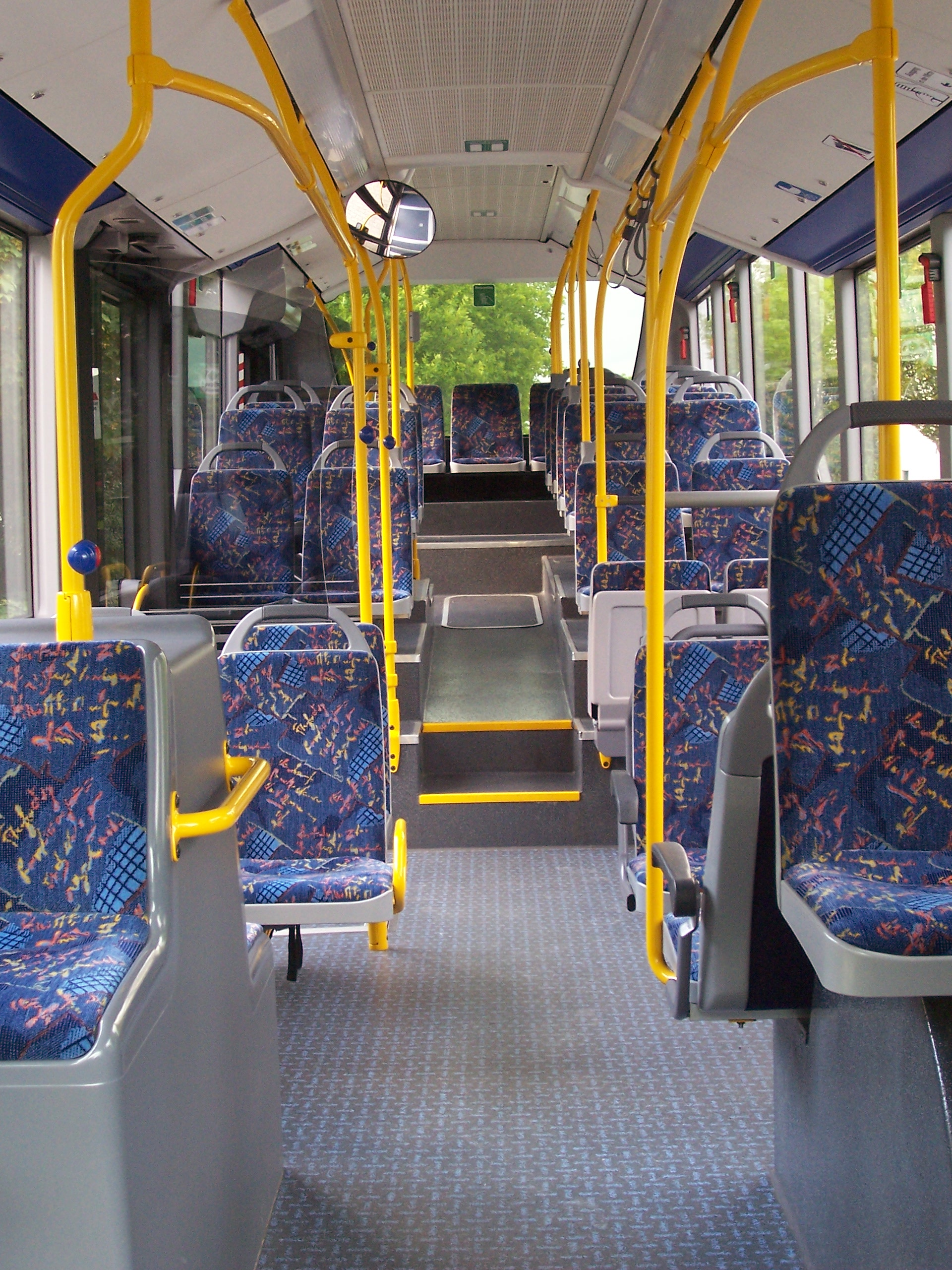 Innenansicht eines Mercedes-Benz Citaro LE ESWE Verkehr GmbH Wiesbaden.